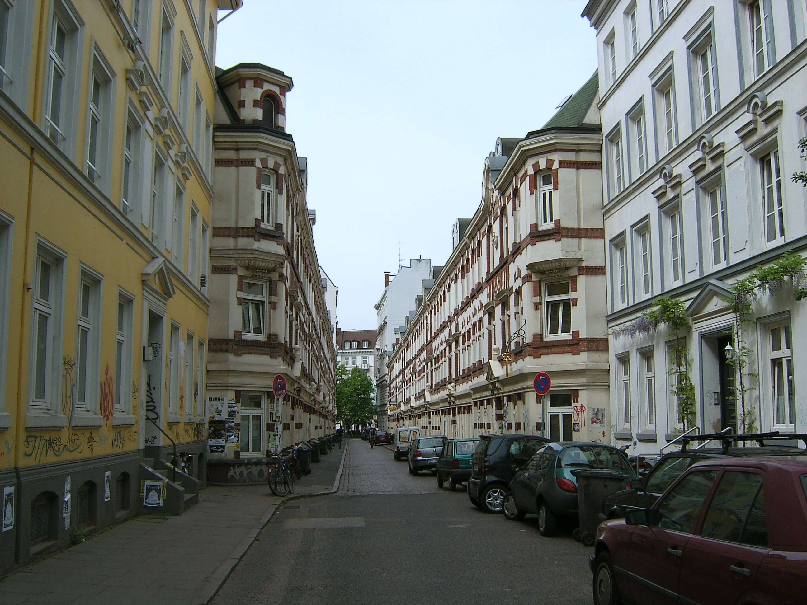 Hamburg, Schanzenviertel, Beckstraße